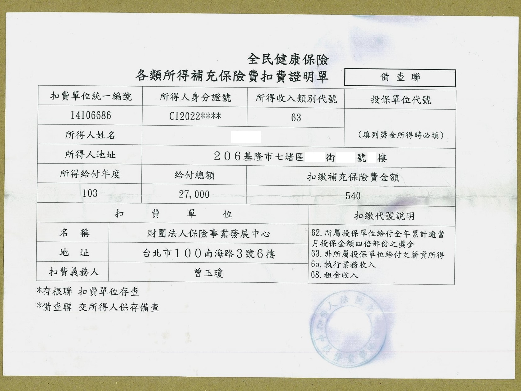 2015年5月，財團法人保險事業發展中心開立的全民健康保險各類所得補充保險費扣費證明單。